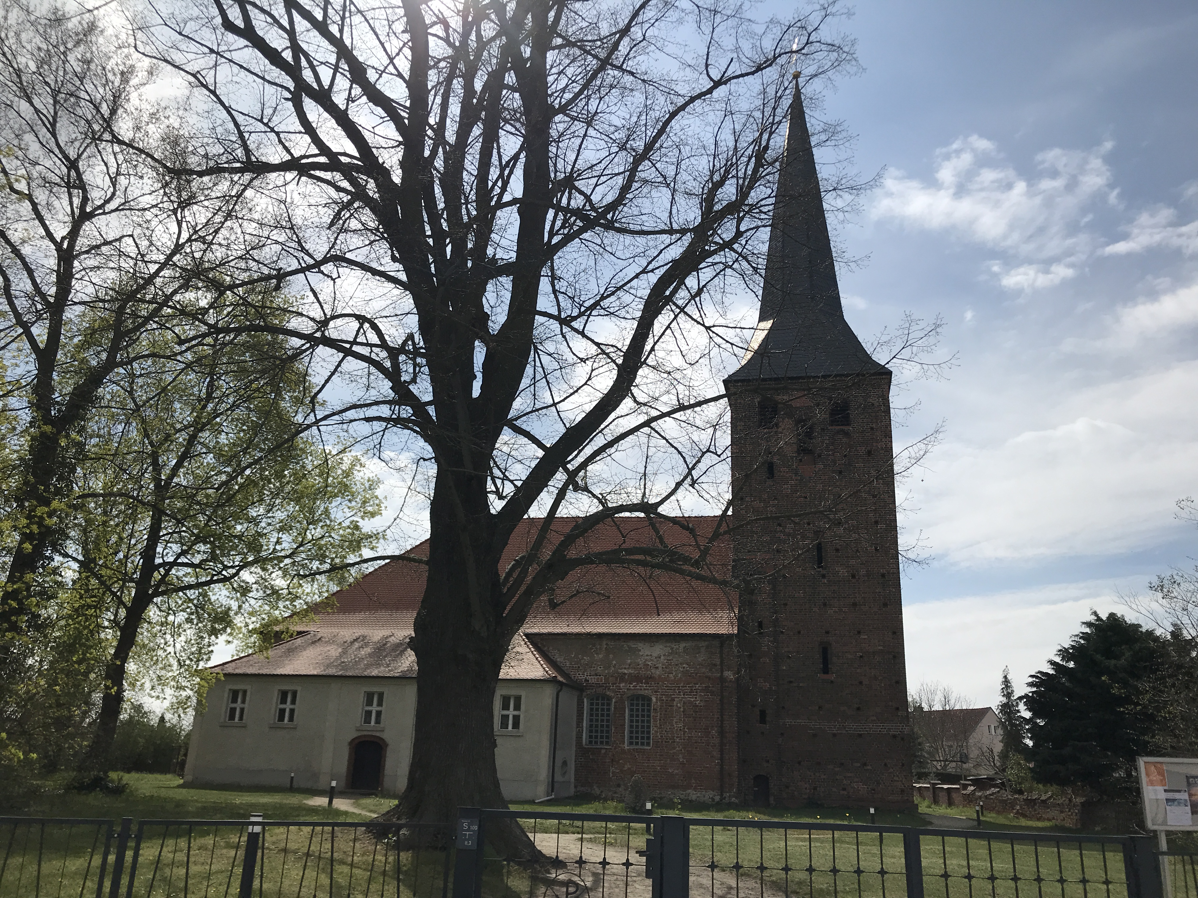 Die Dorfkirche Krieschow in der Gemeinde Kolkwitz im Landkreis Spree-Neiße ist eine Saalkirche aus dem 15. Jahrhundert. Im Innern steht unter anderem ein Altarretabel aus dem Jahr 1680.